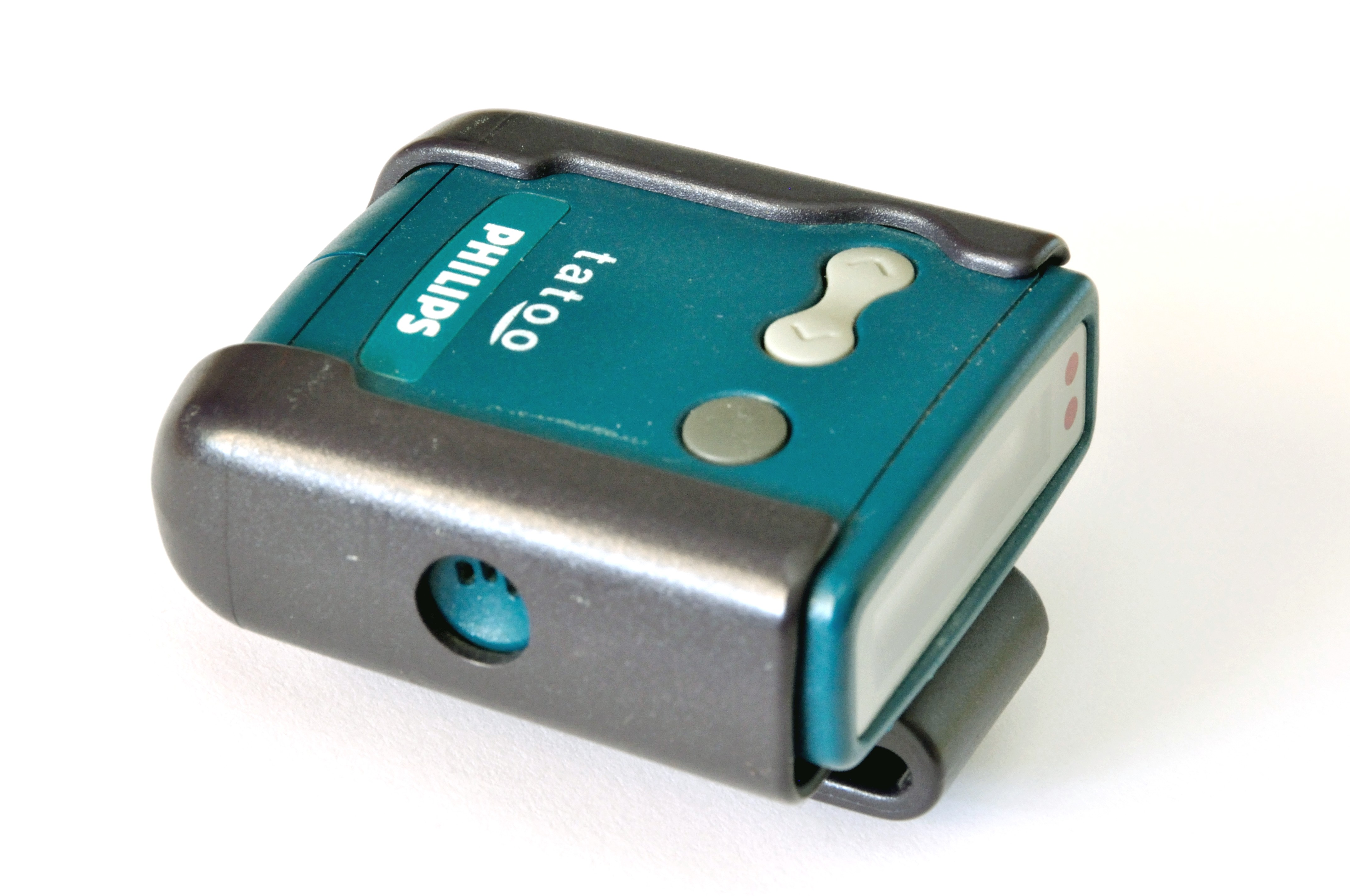 Récepteur de message Tatoo. Le modèle présenté est de la marque Philips.